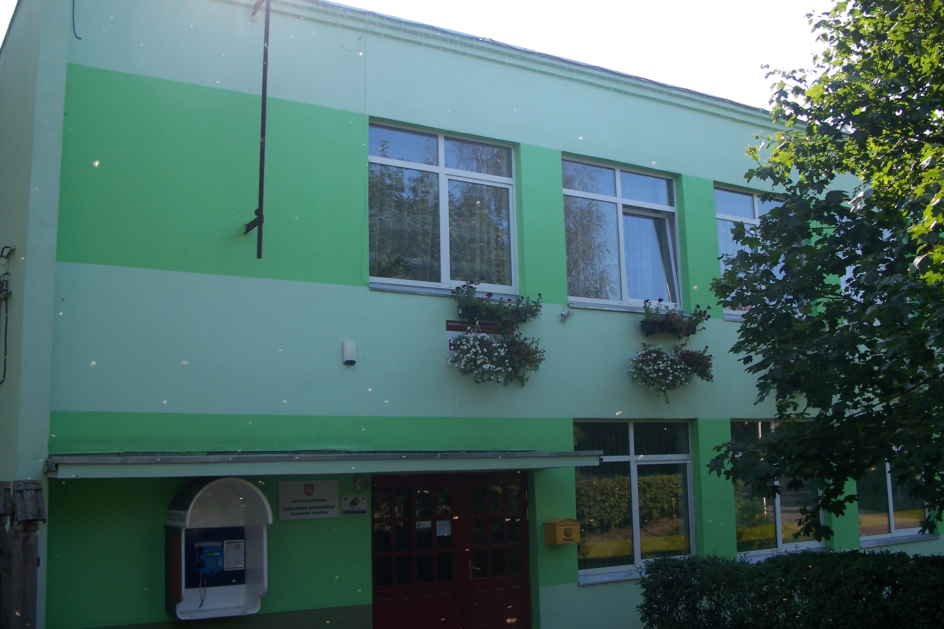 Semeliškių seniūnija